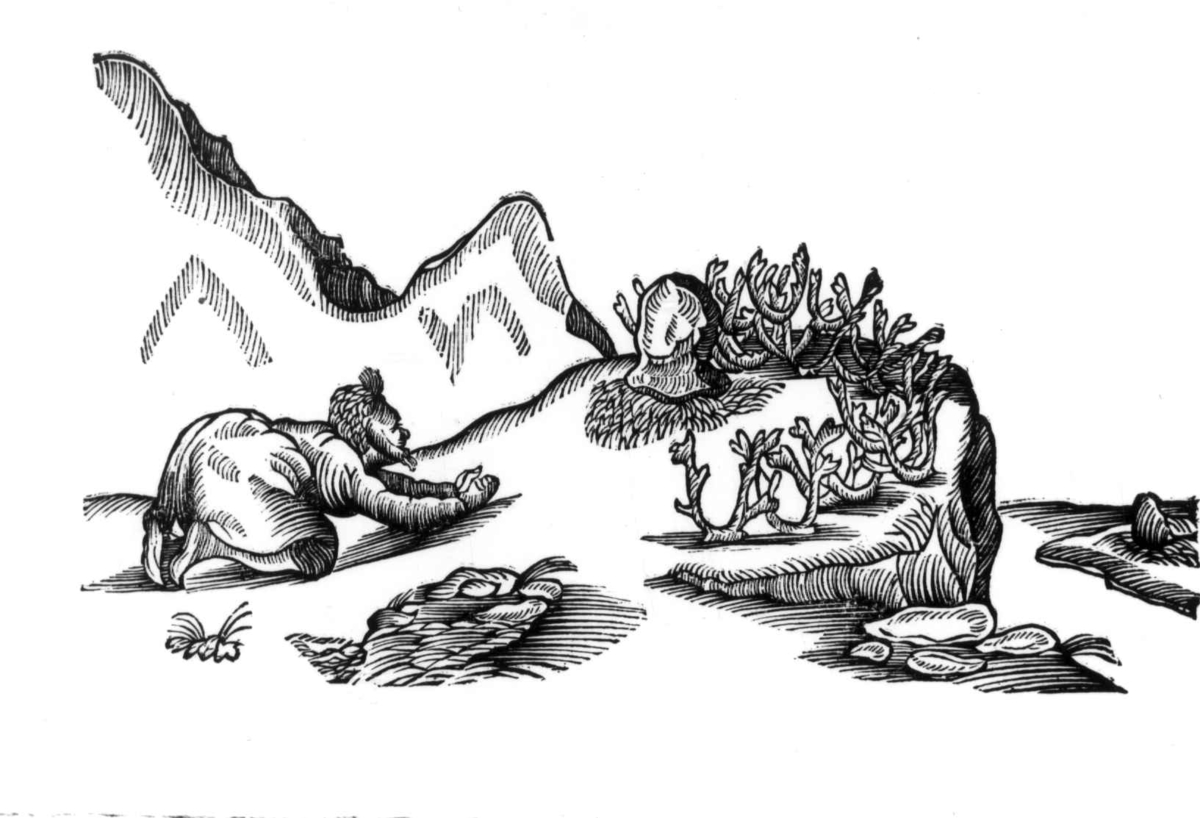 Gebet an einer samischen Opferstelle, Zeichnung in J. Schefferius: Lapponia (1673)